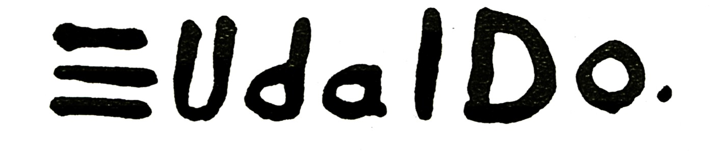 Signature du peintre français d'origine chilienne Eudaldo. Scan d'après carton d'invitation. This signature is believed to be ineligible for copyright and therefore in the public domain because it falls below the required level of originality for copyright protection both in the United States and in the source country (if different). In this case, the source country (e.g. the country of nationality of the signatory) is believed to be France. Cette image ou le texte qui y est représenté est seulement composé de formes géométriques simples et de texte. Elle n’atteint pas le seuil d'originalité nécessaire pour la protection du droit d’auteur, et est donc du domaine public. See autographs of Magritte and Picasso